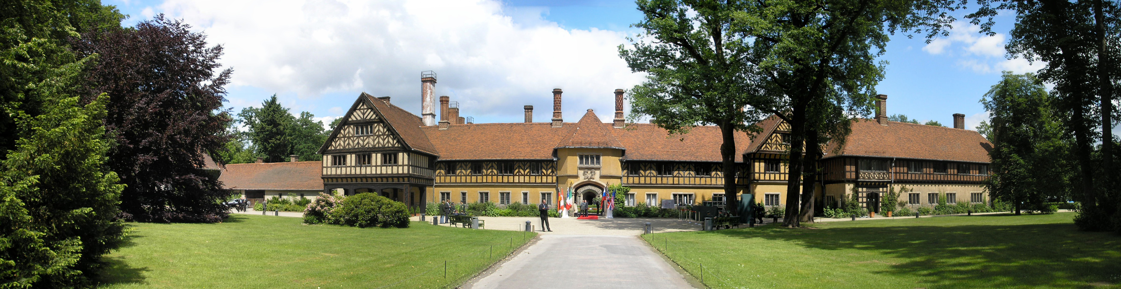 Schloss Cecilienhof in Potsdam